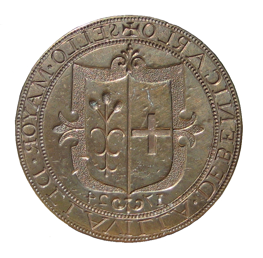 Segell Major de l'Ajuntament de Benicarló de 1724 (Baix Maestrat)